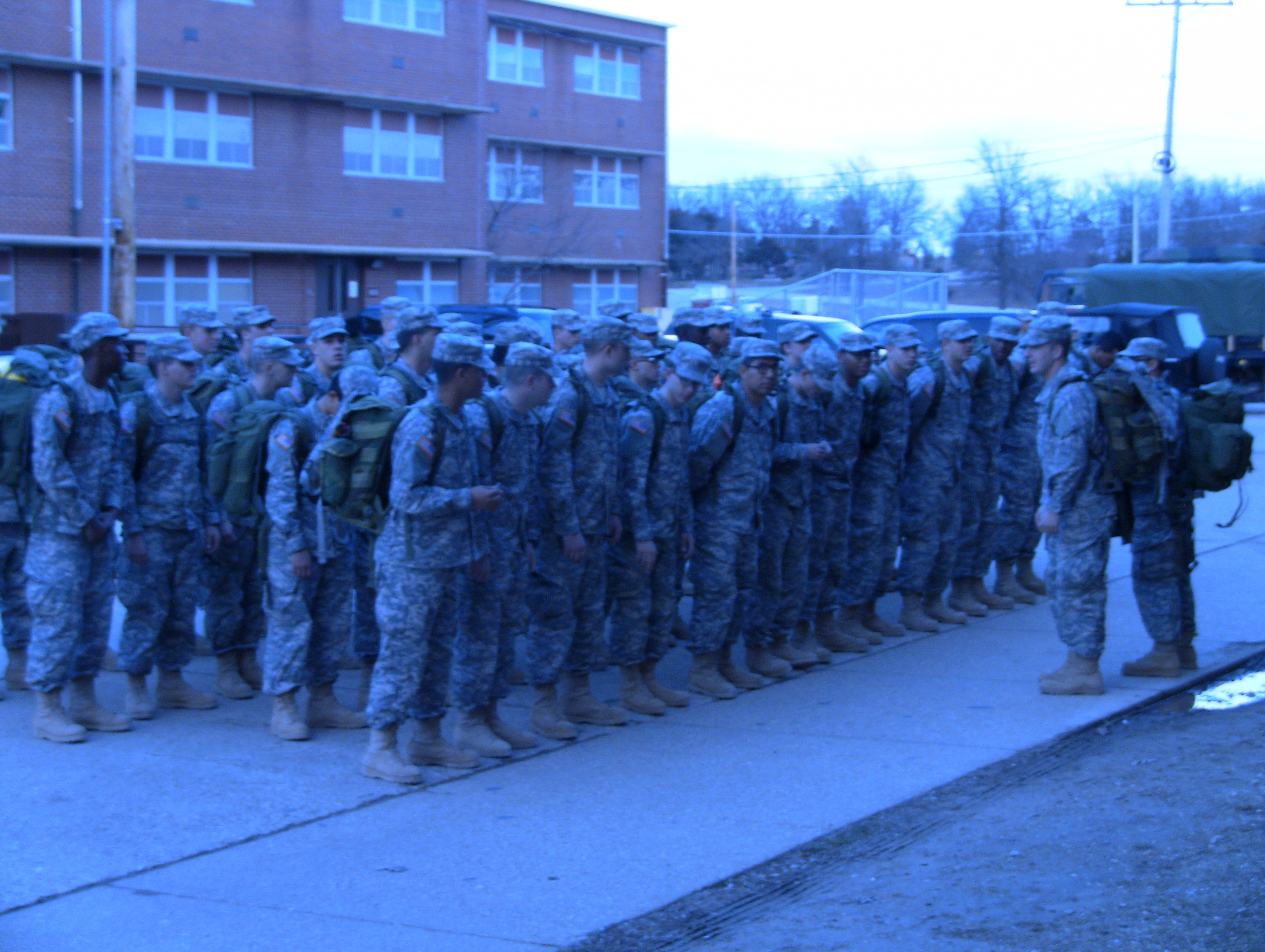 アメリカ陸軍新兵訓練生